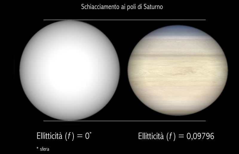 Schiacciamento ai poli del pianeta Saturno confrontato con una sfera (schiacciamento = 0).